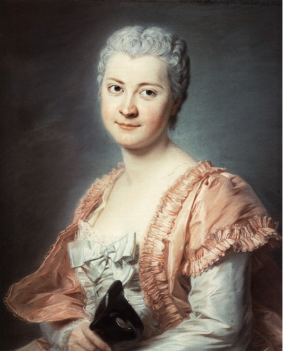 Portrait présumé de Mme Savalette de Lange, née Marie-Emilie Joly de Choin (1726–1776)